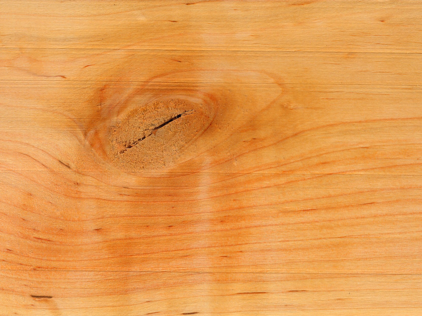 Alnus glutinosa, przekrój styczny przez drewno olszy czarnej